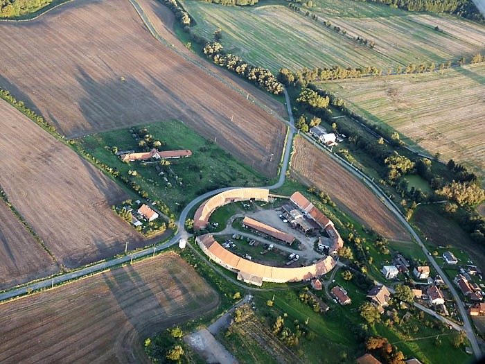 Dvůr Karlov